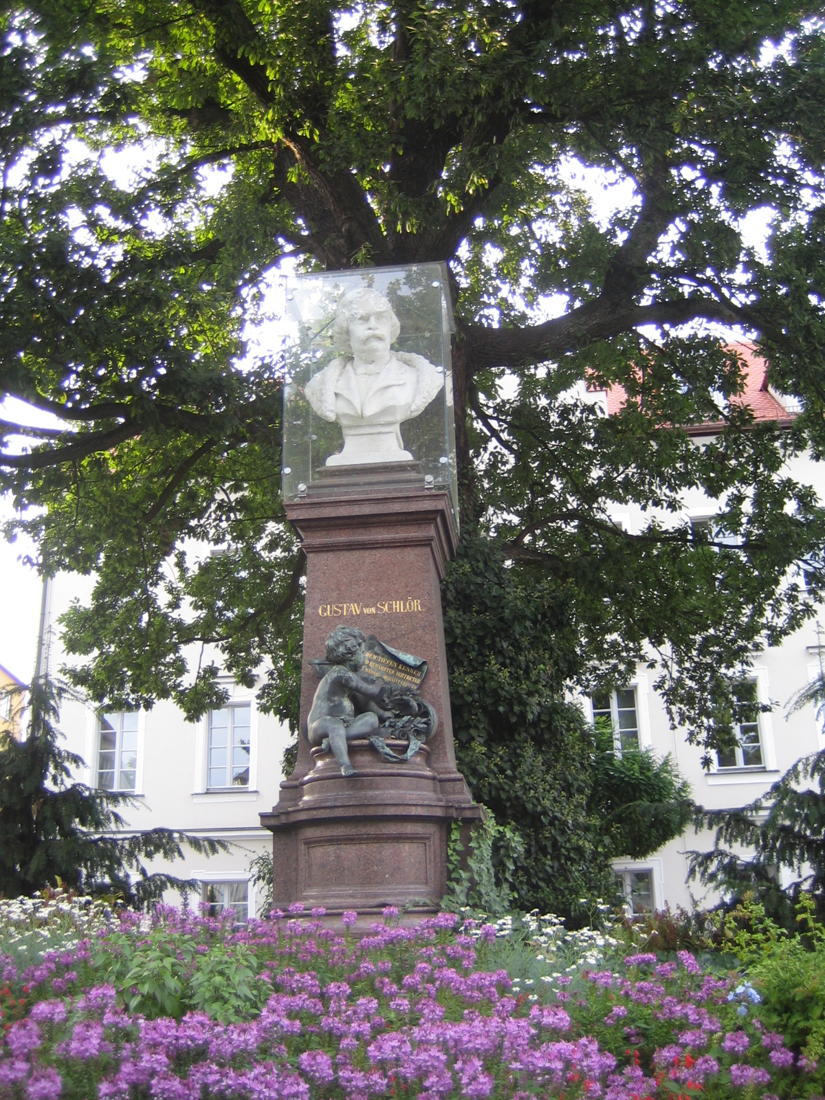 Büste von Gustav von Schlör, Altstadt Weiden i.d.OPf.